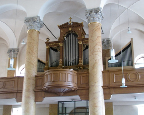 Orgel in der St.-Sebastian-Kirche in Mannheim.